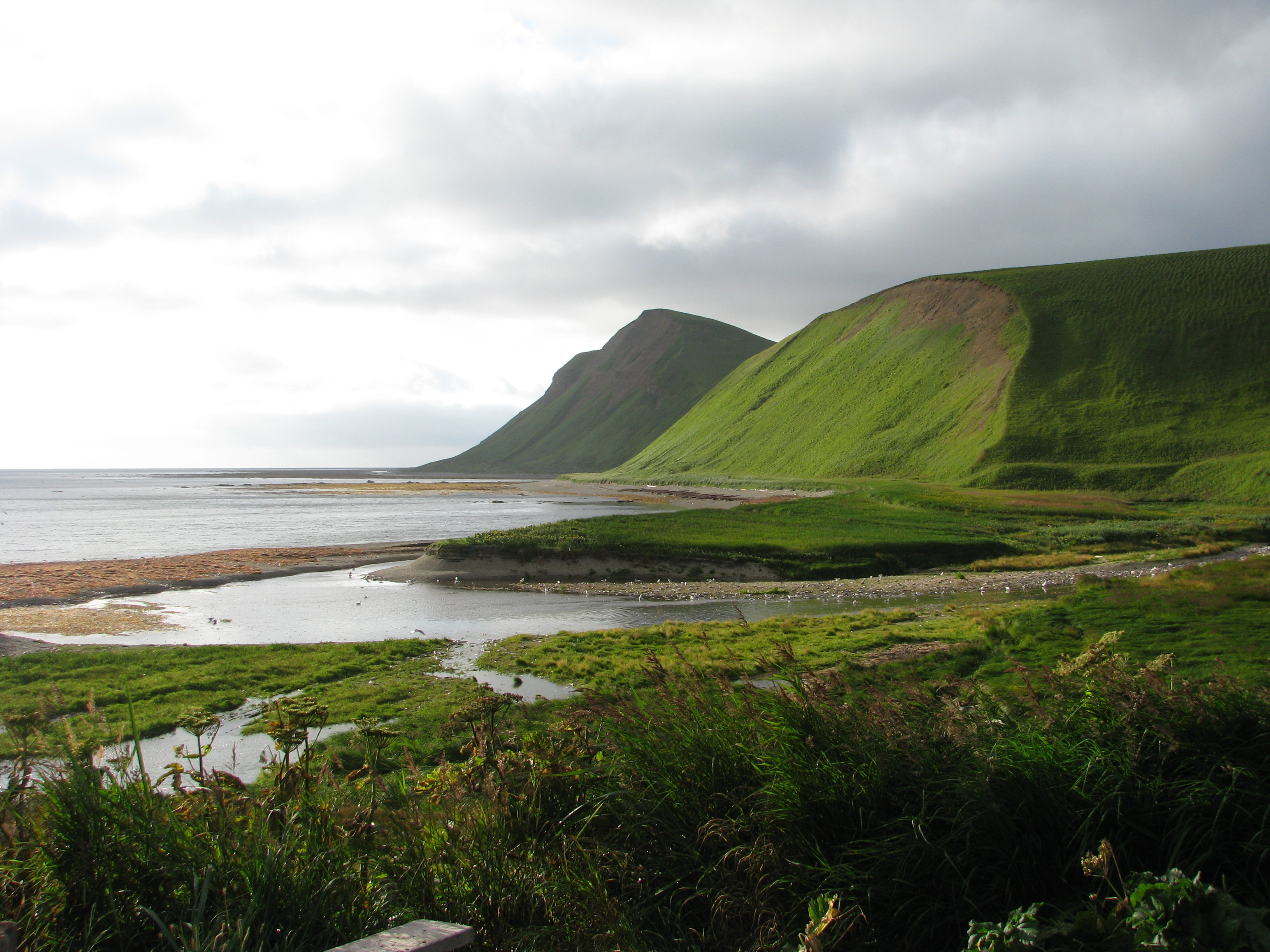 Бухта Буяна, Алеутский район This image is related to the protected area of Russia number 4110005